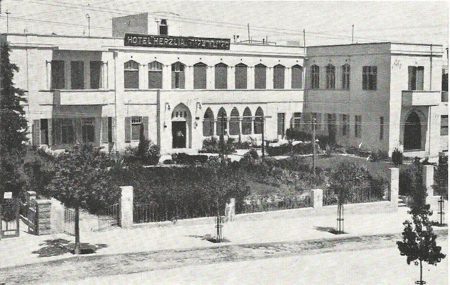 בית הוועד הפועל של ההסתדרות ברחוב אלנבי 115 בתל אביב בסמוך לשדרות רוטשילד, ואל מול רחוב לילינבלום. בשנים 1926-1929 שכן במבנה מלון 'הרצליה'. היה משכנה של מפקדת ההגנה הארצית בשנות ה-30 של המאה ה-20. הבניין נהרס ובאתר הוקם מבנה משרדים גדול.